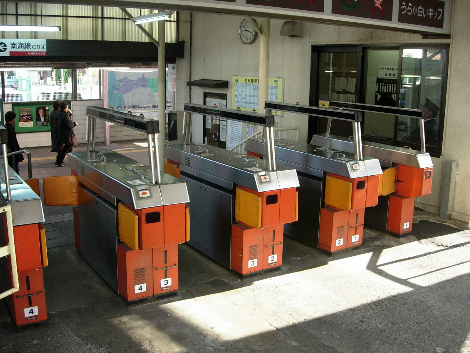 水間鉄道貝塚駅にある自動改札（自動改札の中でも初期のもので、南海電鉄の中古品である）